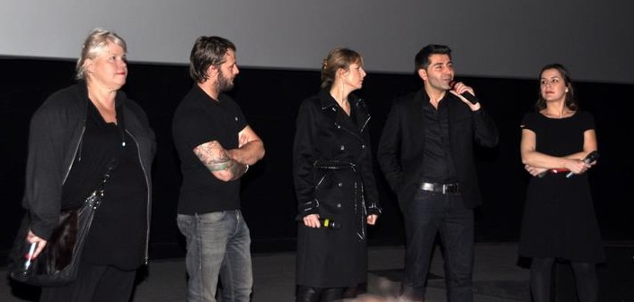 Avant-première de Parlez-moi de vous avec l'équipe du film. De gauche à droite : les acteurs Catherine Hosmalin, Nicolas Duvauchelle et Karin Viard, le réalisateur Pierre Pinaud, la productrice Stéphanie Carreras.